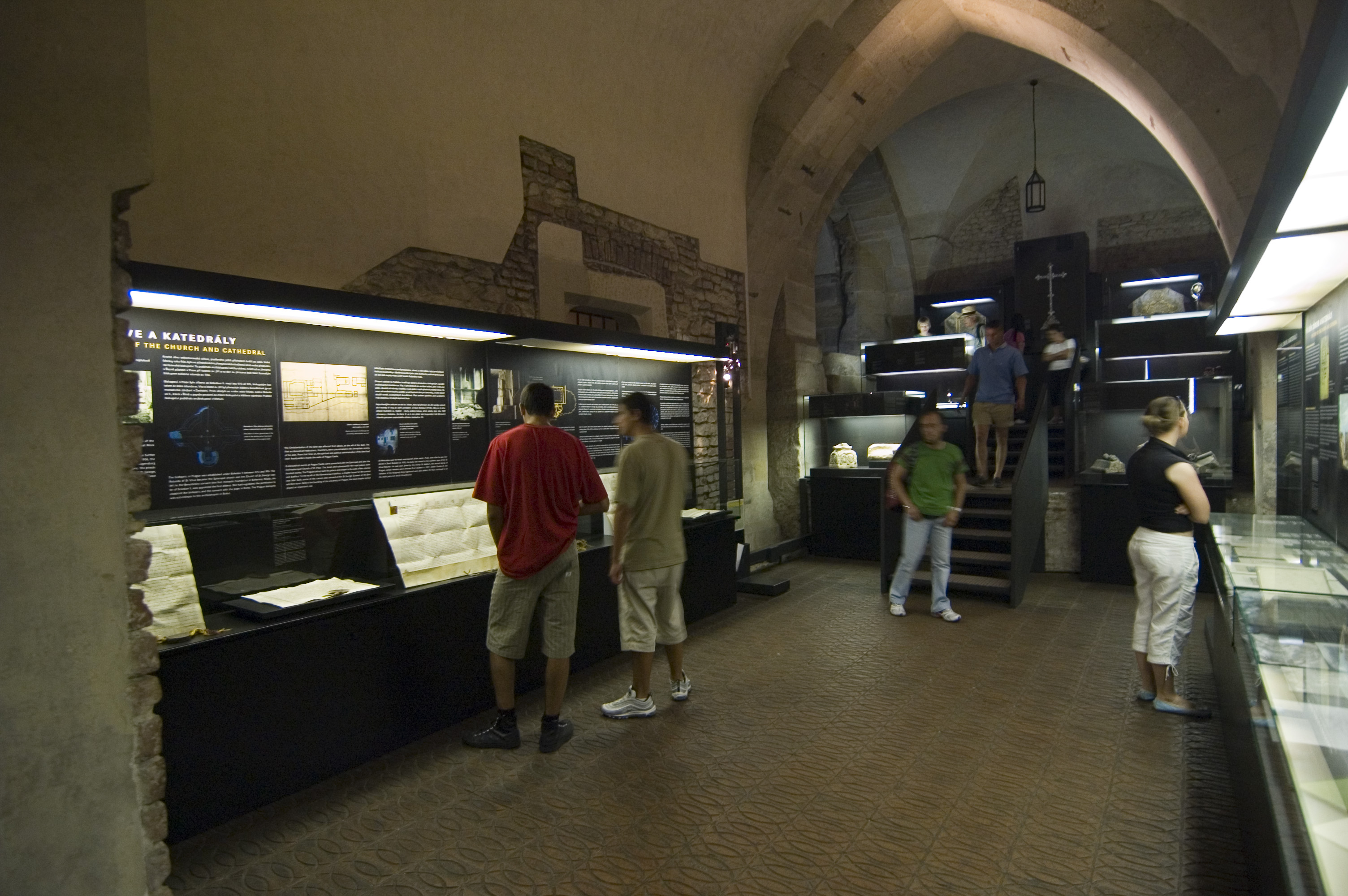 Pražský hrad, Starý královský palác